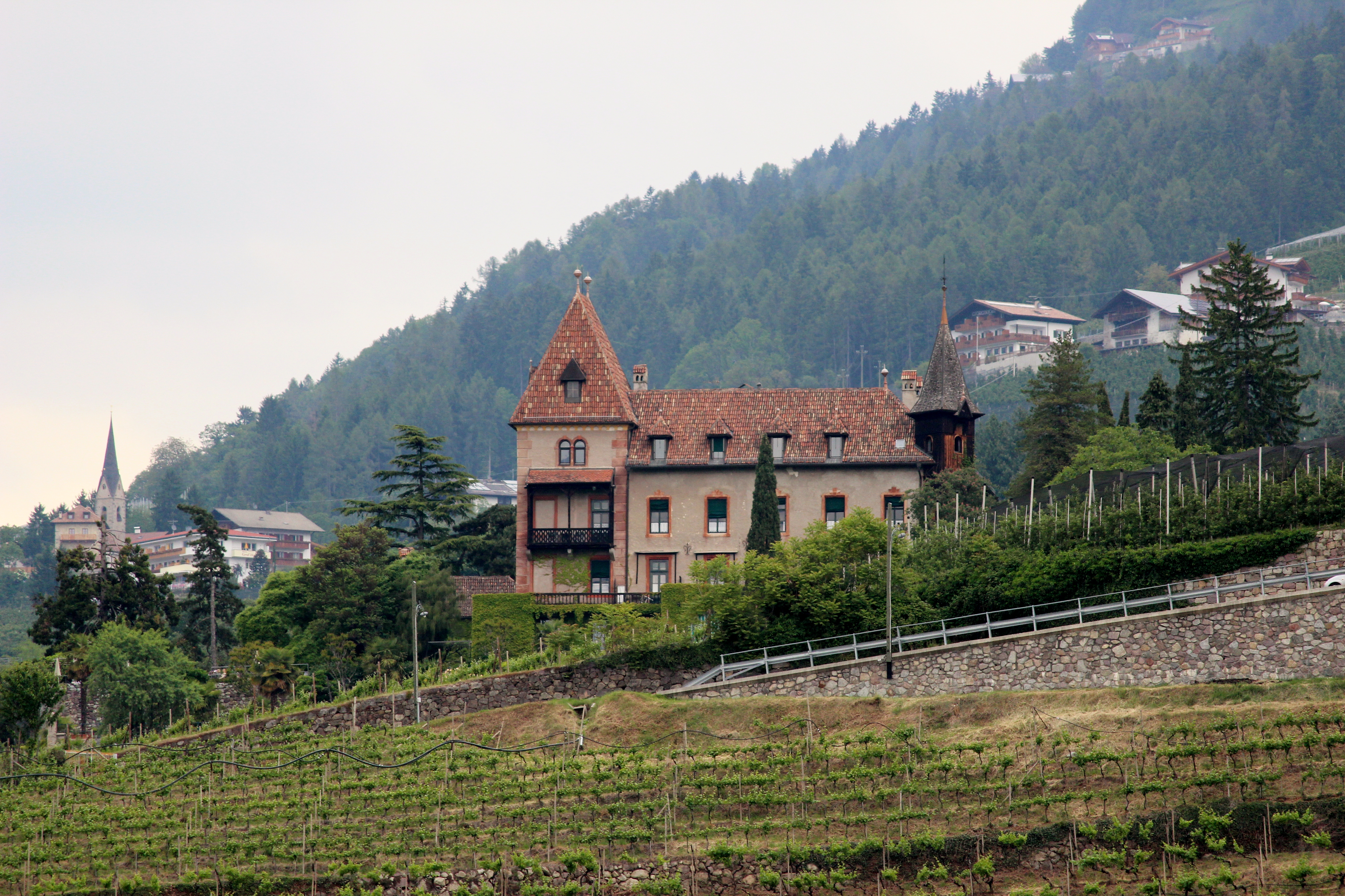 Labers